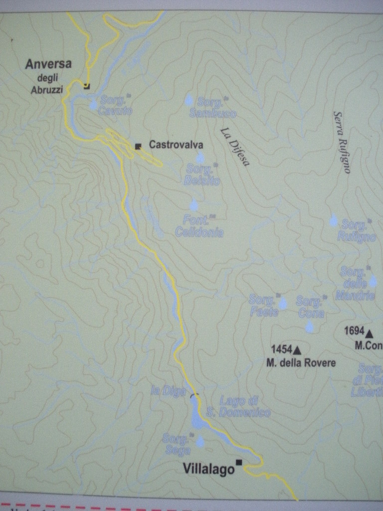 Mappa del territorio delle Gole del Sagittario Foto personale